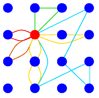 Cammini di scattering in un cluster bidimensionale. Disegno di Bruce Ravel.